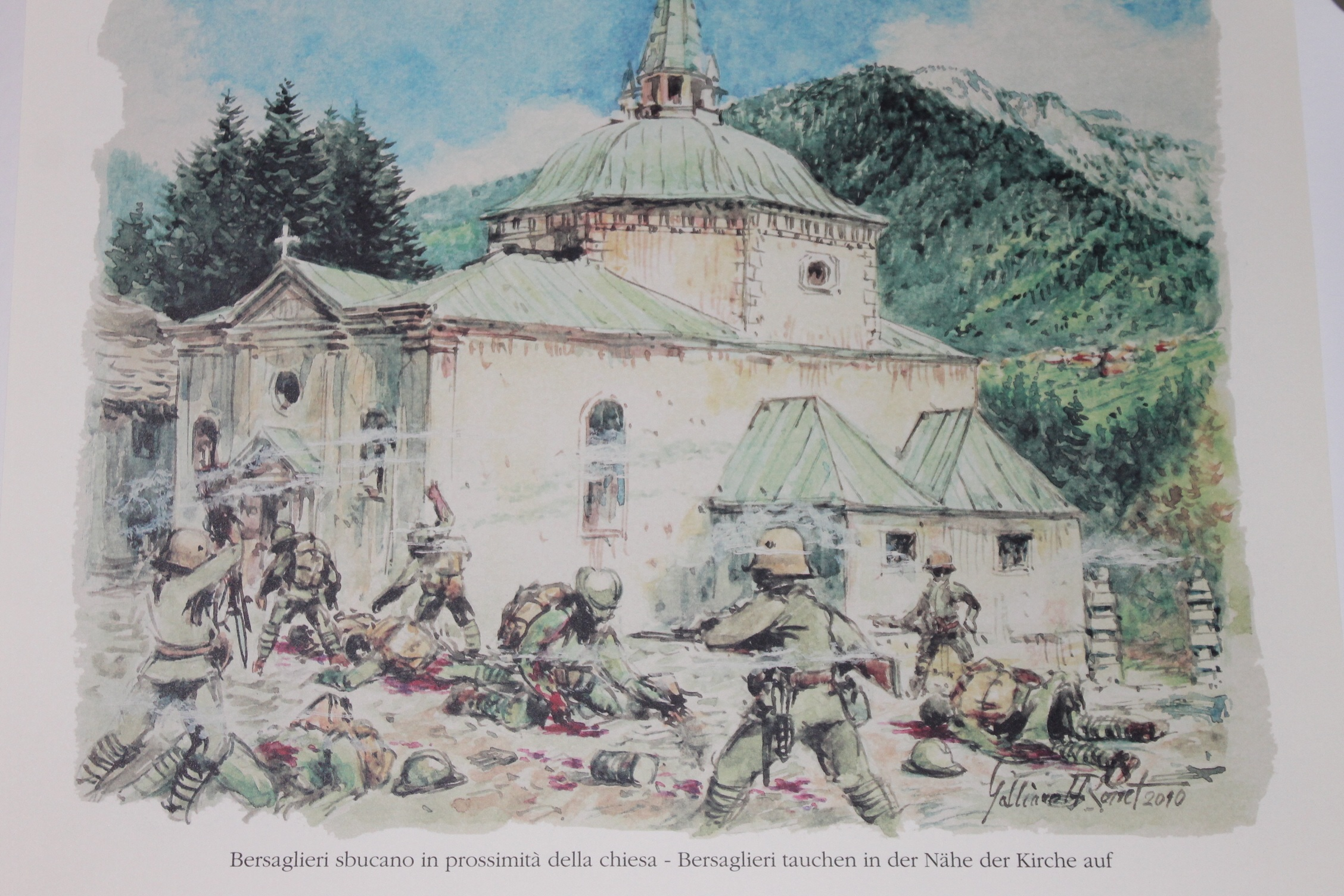 chiesa prima